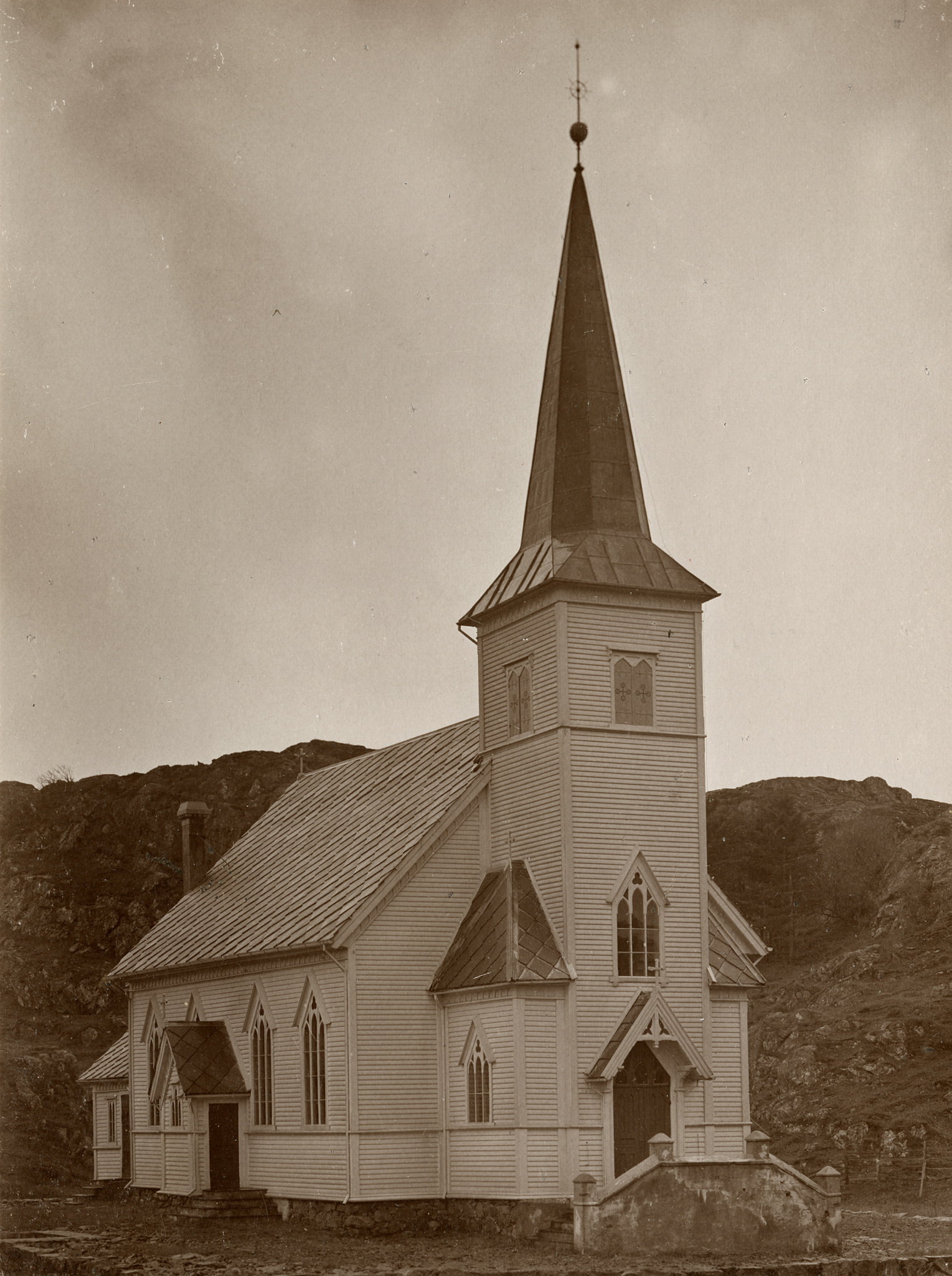 Møkster kirke. Foto: Christian Christensen Thomhav, fra Kulturminnebilder.no.